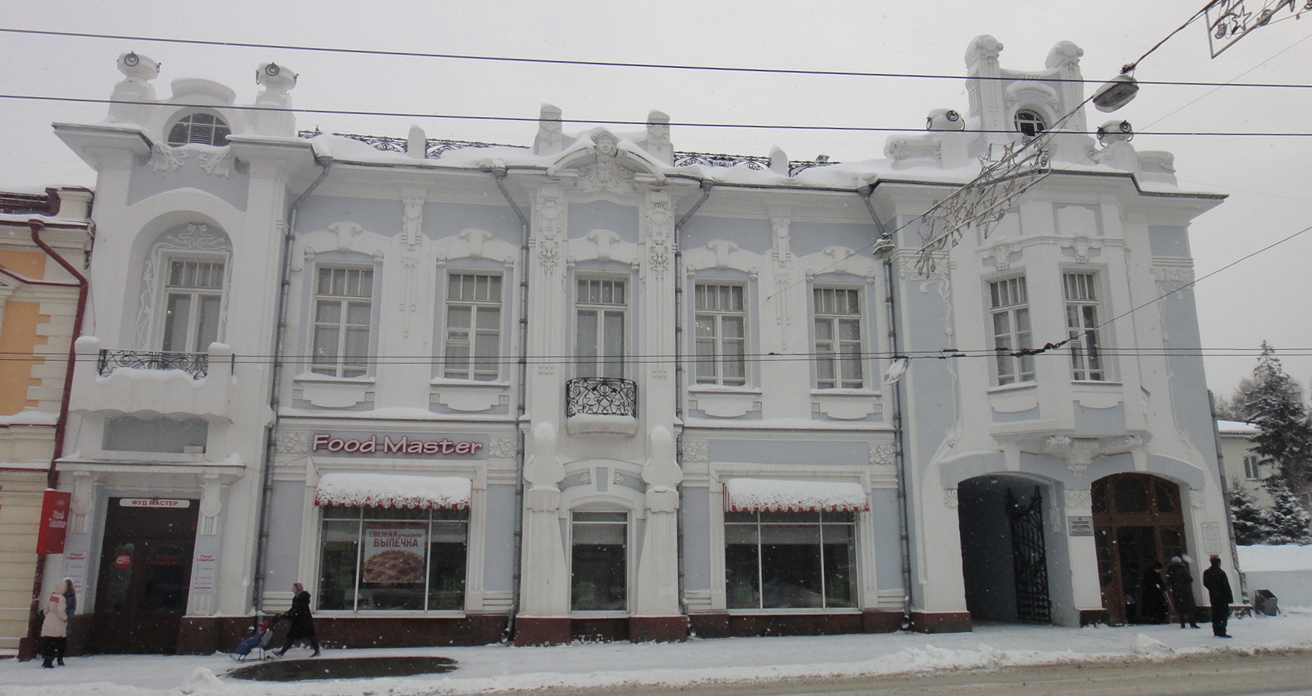 Дворец бракосочетаний (Томск)